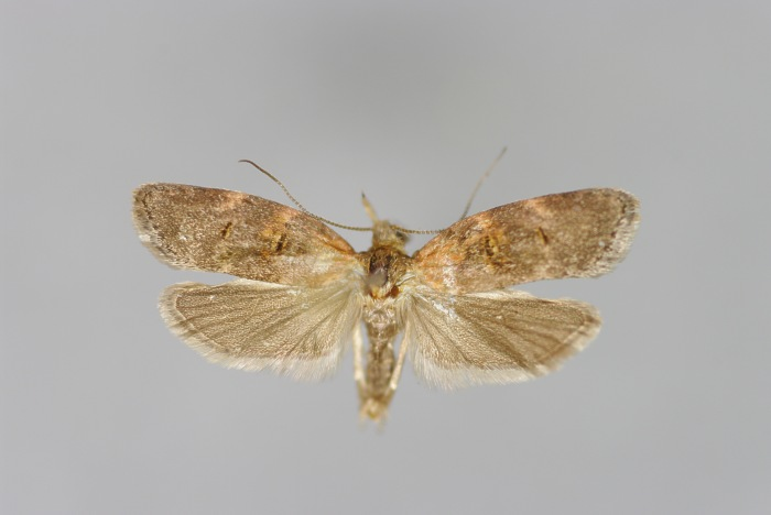 Anchinia cristalis, Männchen